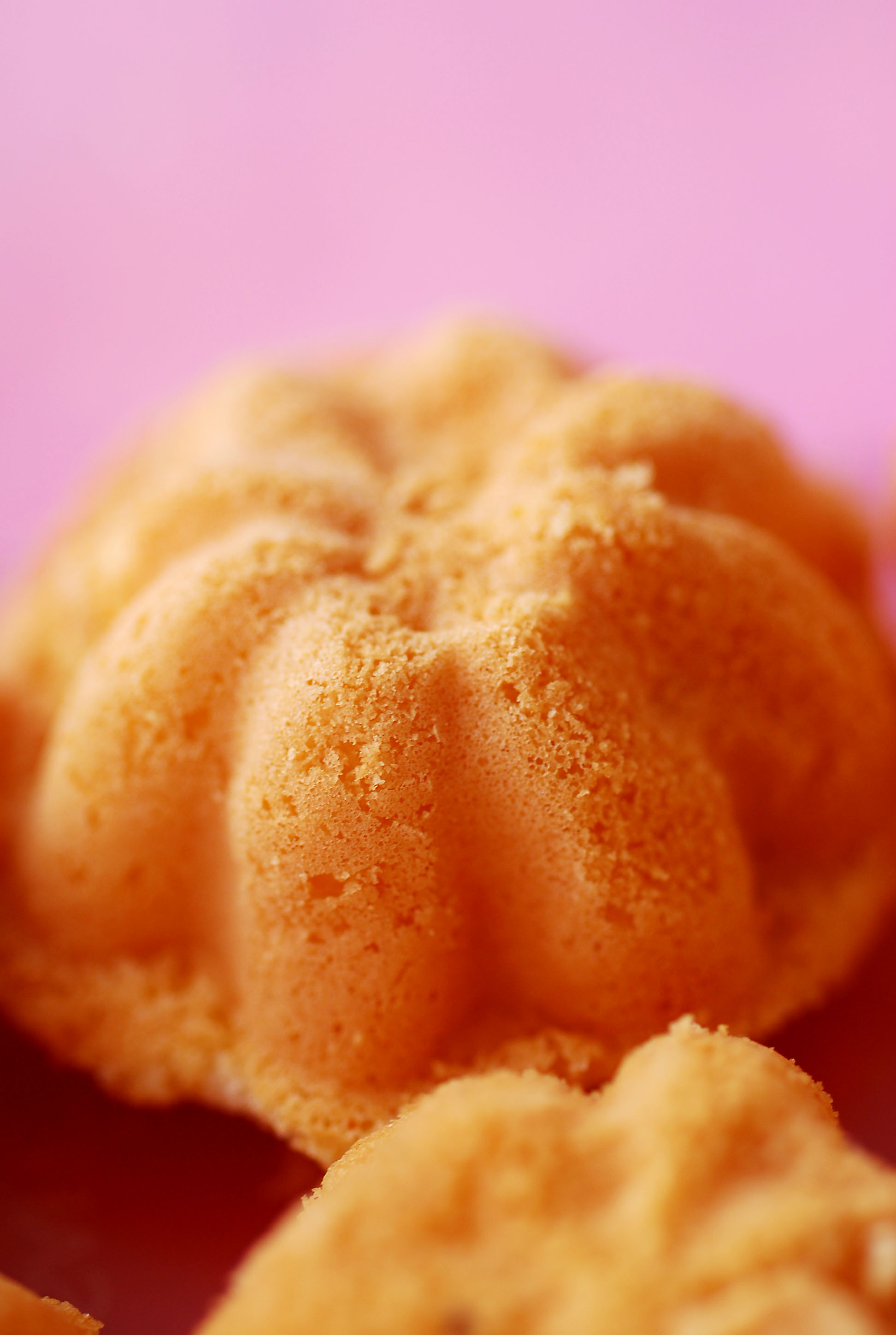 Food detail. Kuih Bahulu. Picture taken using my nikkor 60mm f2.8 macro